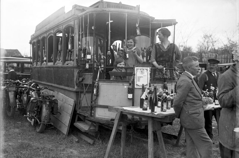 Die grosse Baumblüte in Werder b/Berlin, welche alljährlich hundertausende von Besuchern nach dem idyllischen Havelstädtchen anzieht. Ein ausser Dienst gestellter Strassenbahnwagen der Stadt Werder a/Havel als Verkaufsstand für Obstweine. Information added by Wikimedia users.Berichtigung: Ein ehemaliger Wagen der Pferdebahn Werder [1]--Biberbaer (talk) 16:14, 11 December 2008 (UTC)